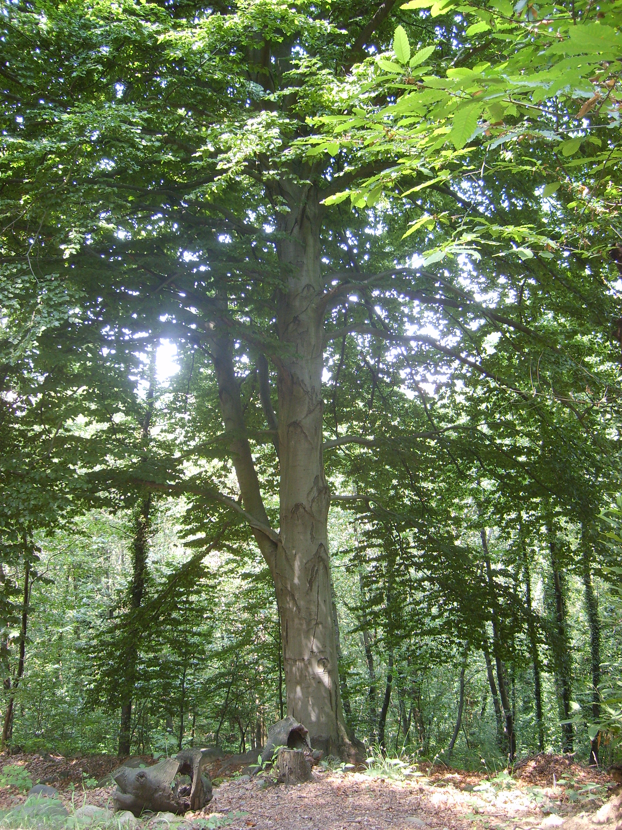 Monumentale faggio presso Bosco del Vaj (Castagneto Po)